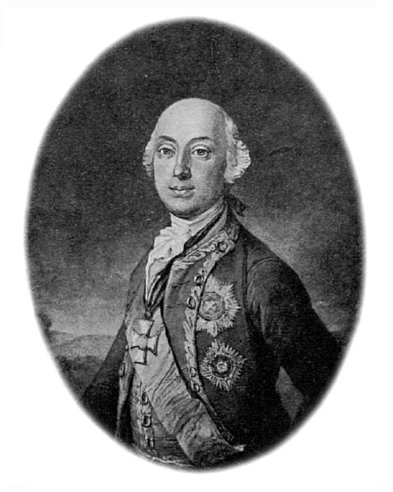 Віктор Амадей Ангальт-Бернбург-Шаумбург-Хойм01: Віктор Амадей Ангальт-Бернбург-Шаумбург-Хойм01